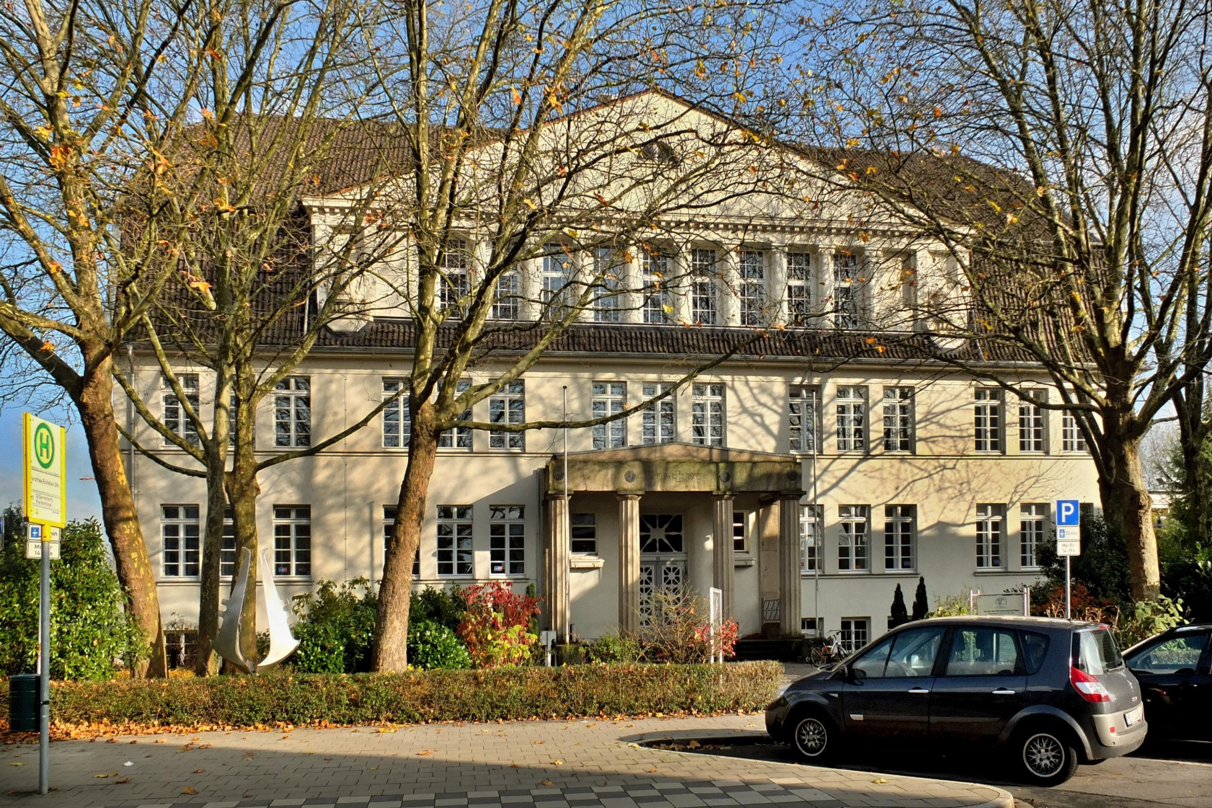 Kultur- und Weiterbildungszentrum „Altes Helmholtz“ in Hilden, Gerresheimer Straße 20; Gebäude erbaut 1913-1915 nach Entwurf des Architekten Peter Klotzbach für die Realschule, später Helmholtz-Gymnasium; seit 1998 unter DenkmalschutzThis is a photograph of an architectural monument.